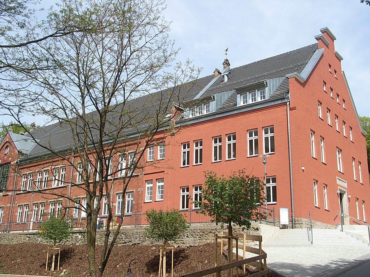 Ehemalige Mädchenschule Zwiesel, jetzt Waldmuseum Zwiesel